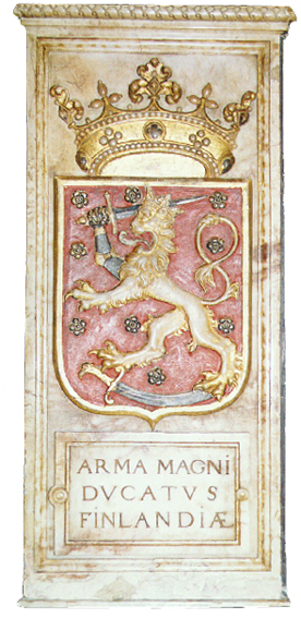 Finlands landskaps vapen vid Gustav vasas grav